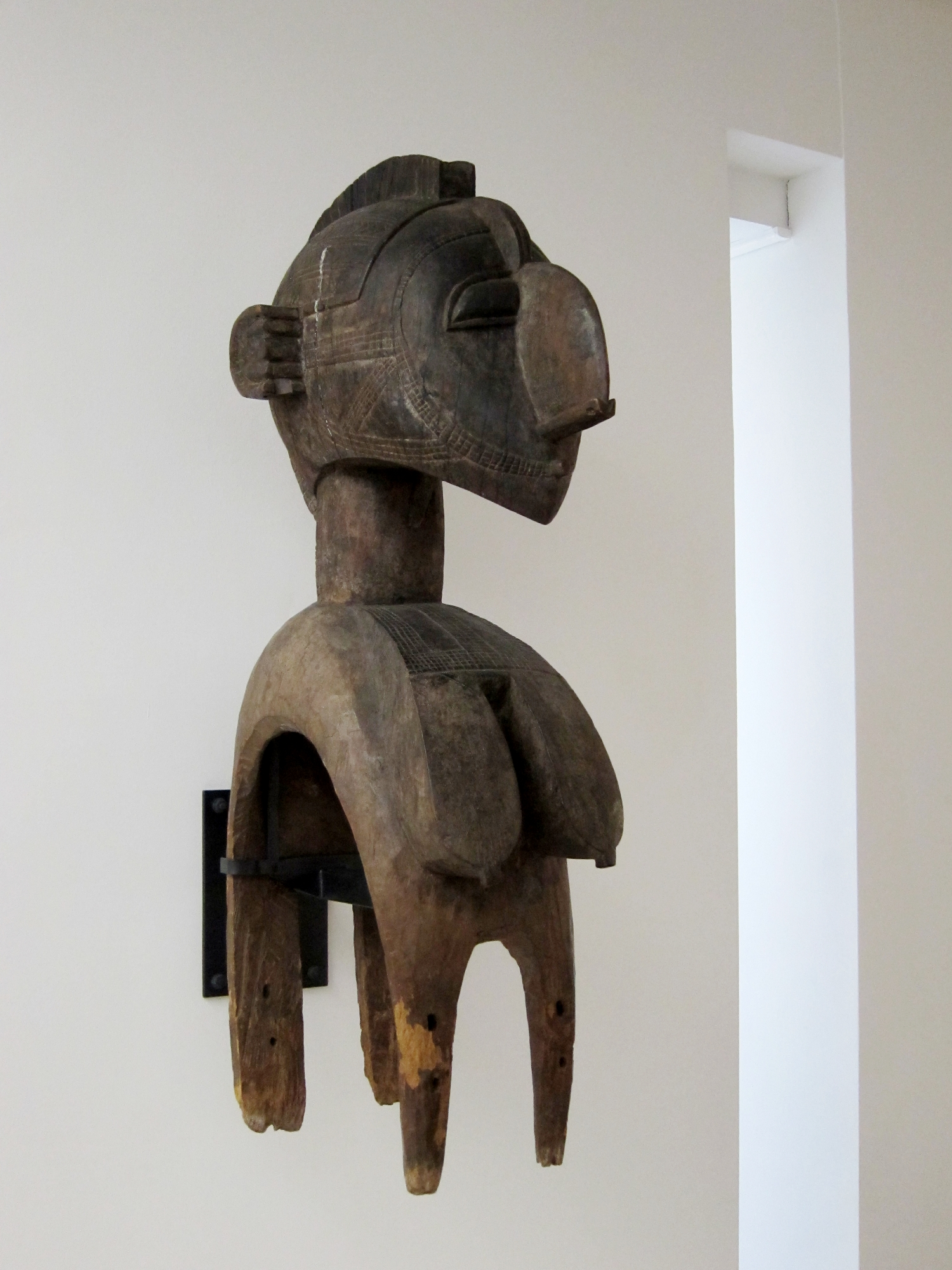 Masque Nimba au LaM de Villeneuve d'Ascq (Nord).